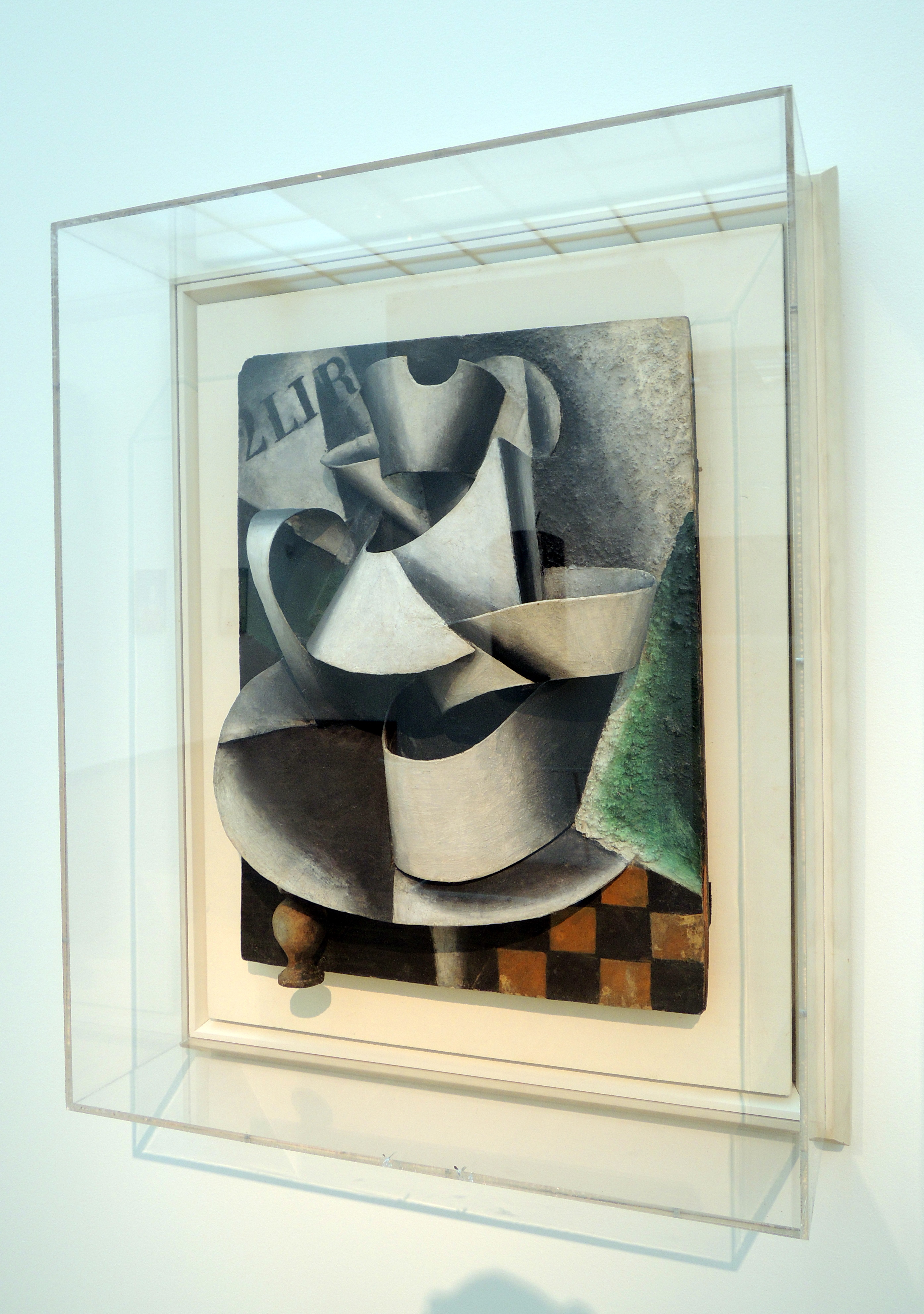 Попова Л.С. (1889-1924). "Кувшин на столе. Пластическая живопись", 1915. Дерево, картон, масло. ГТГ. Инв. Ж-1308. Дар Г.Д. Костаки, 1977